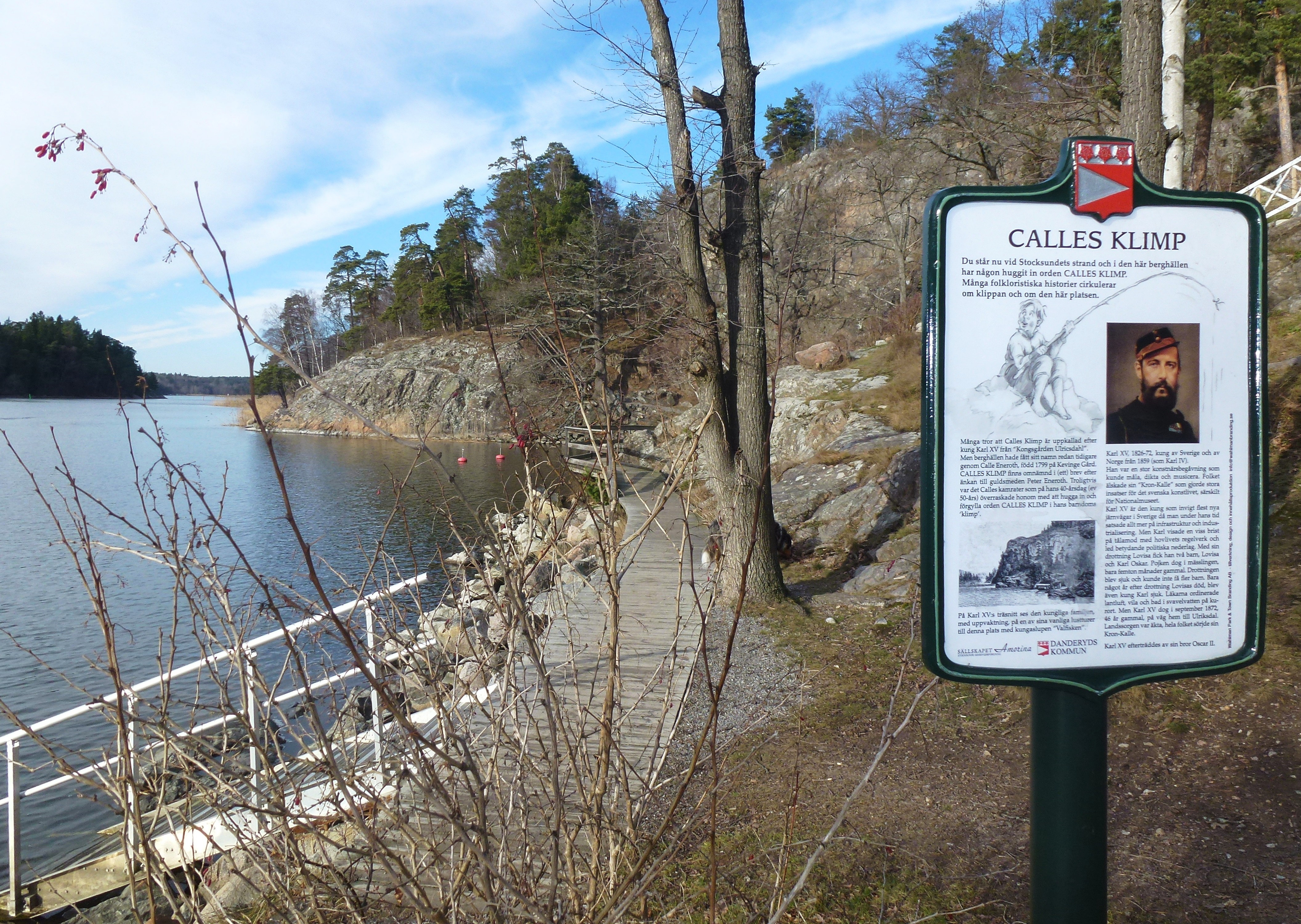 Calles klimp, Stocksundet